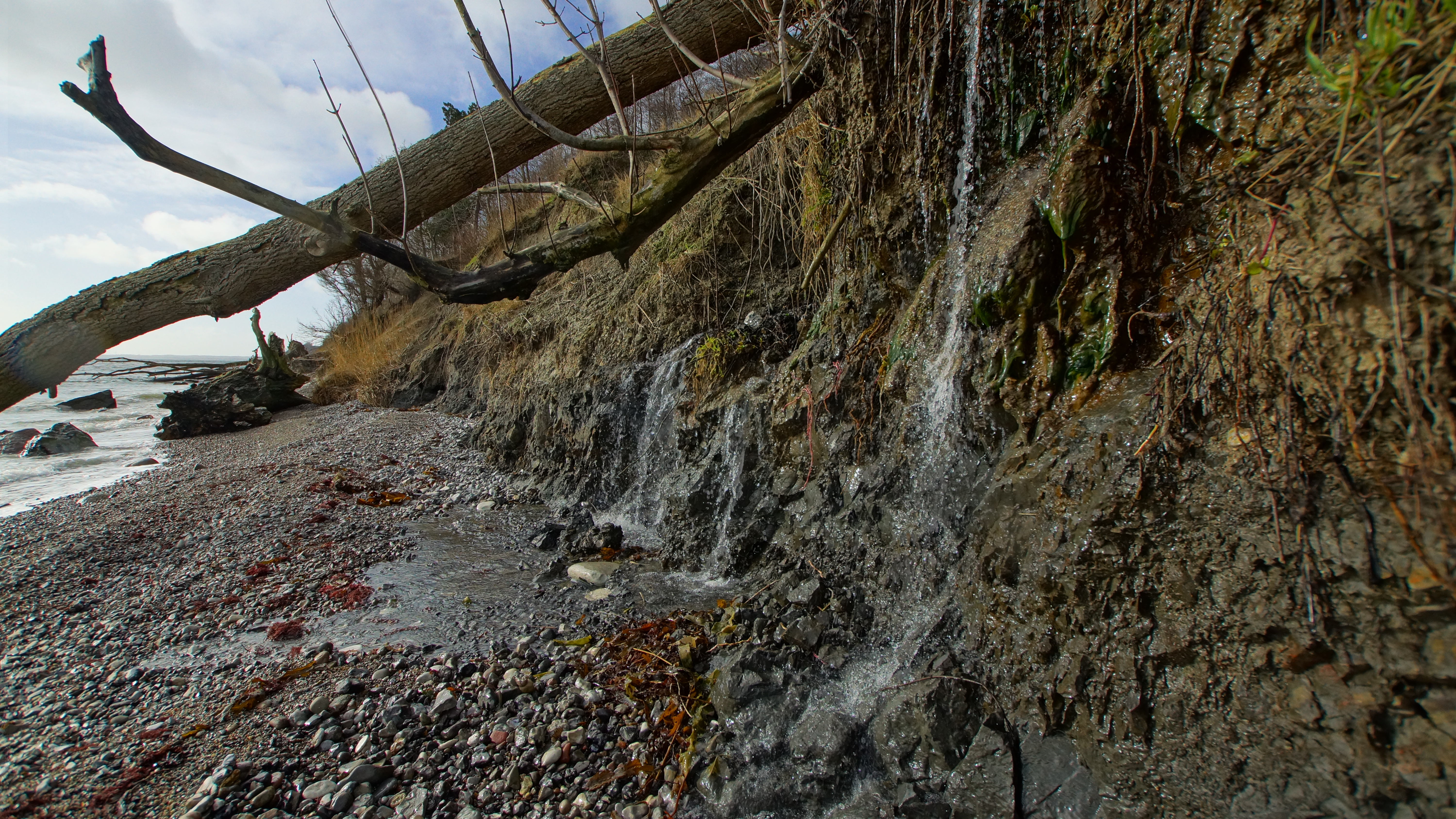 Rugård Skov, vandfald, væltet træ